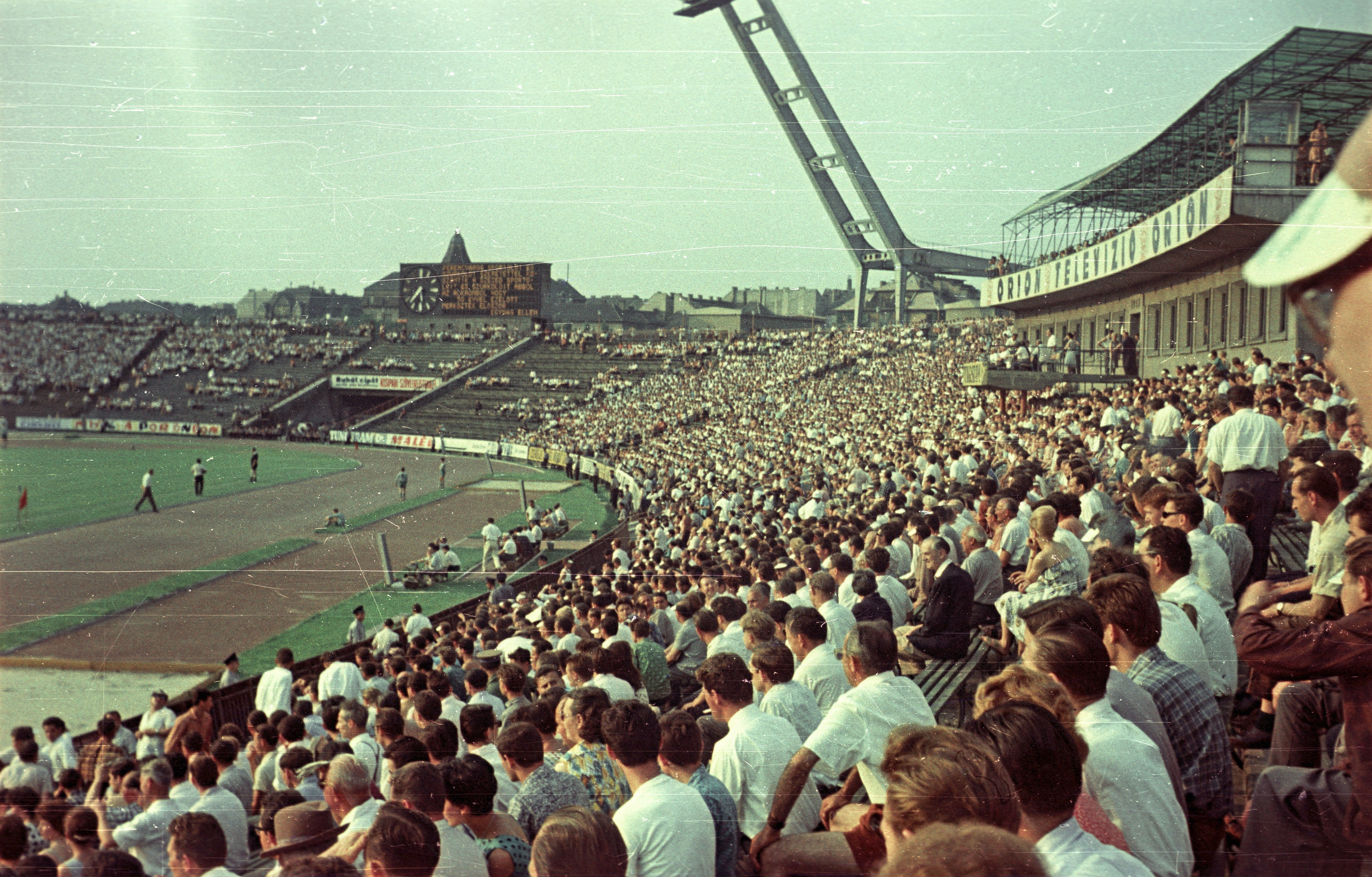 1963. június 30., Ferencváros - Szegedi EAC 3:1 bajnoki labdarúgó mérkőzés. Location: Hungary, Budapest XIV., Népstadion Tags: colorful, audience, Budapest Title: 1963. június 30., Ferencváros - Szegedi EAC 3:1 bajnoki labdarúgó mérkőzés.